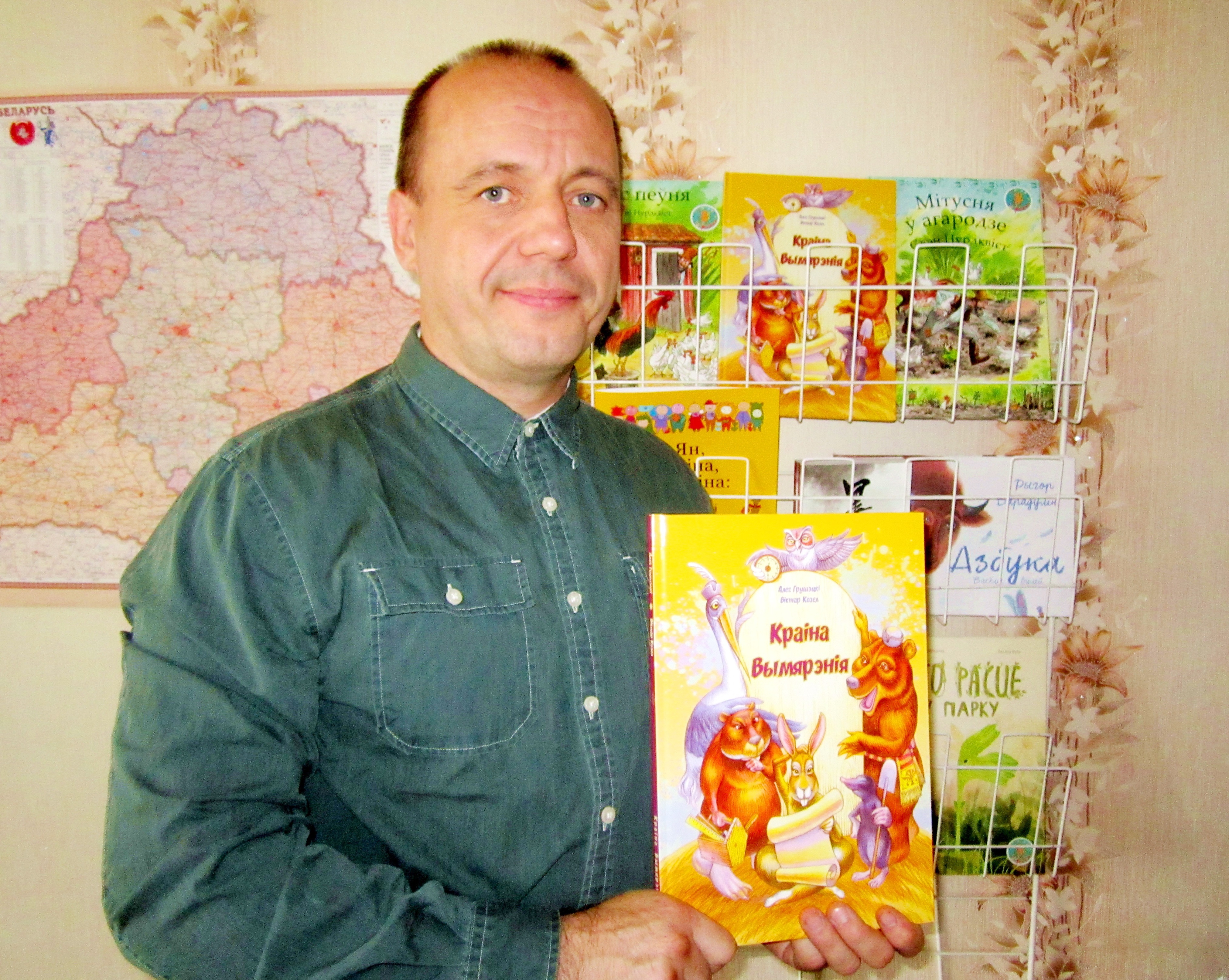 Алег Грушэцкі са сваёй кнігай «Краіна Вымярэнія» у выдавецтве «Кнігазбор»